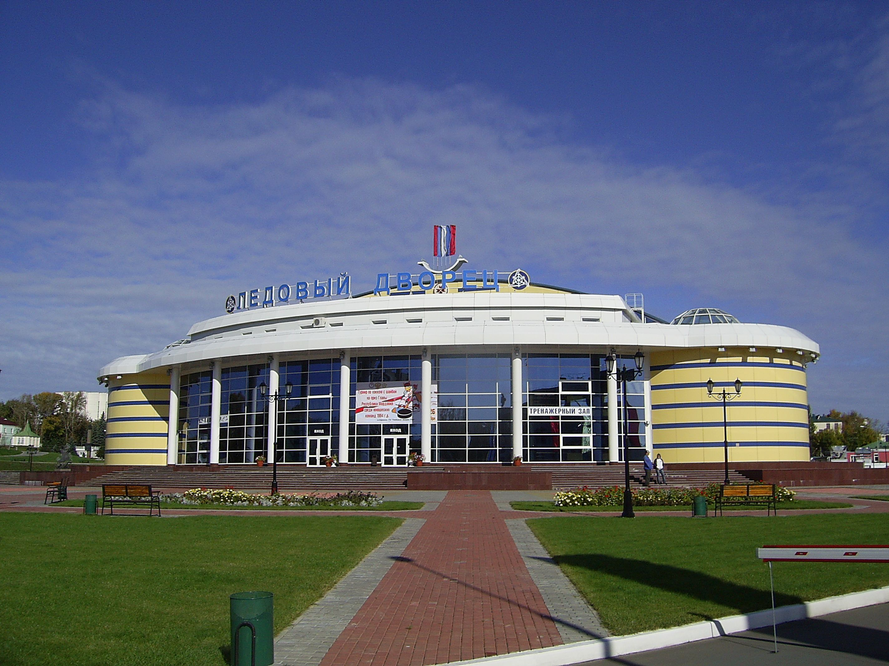 Ледовый Дворец